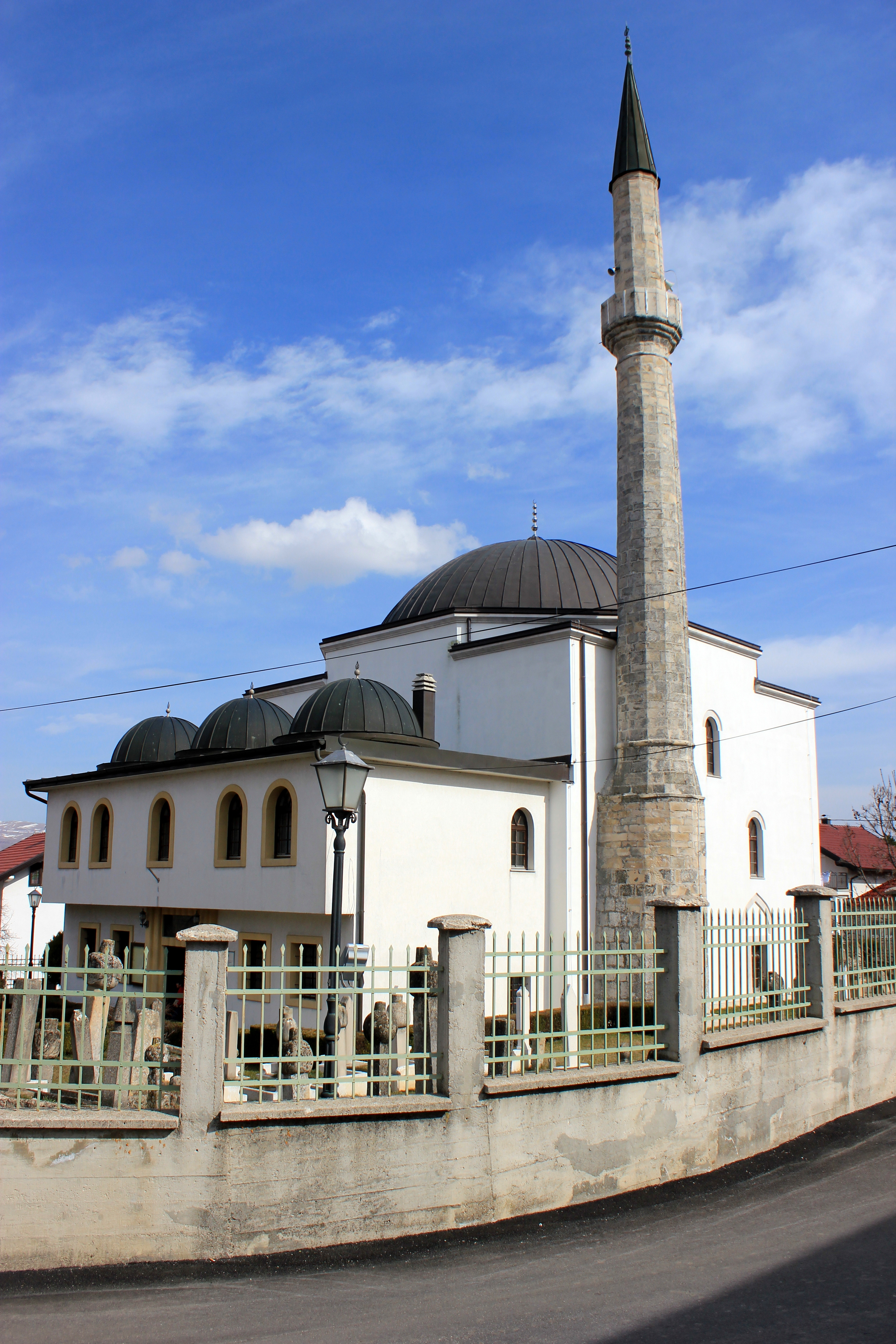 Džudža-Džaferova-Moschee in Tomislavgrad, Bosnien und Herzegowina.